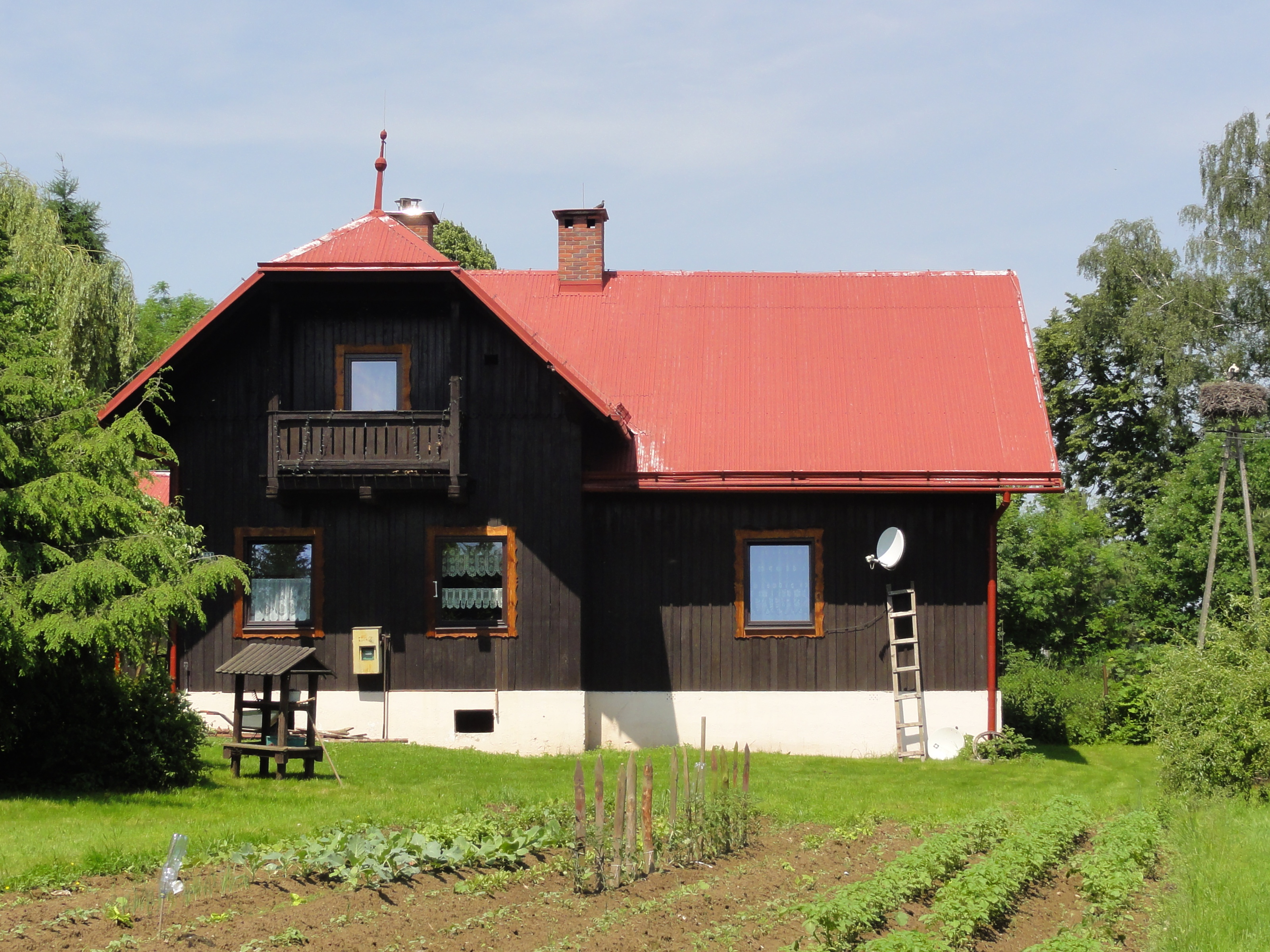 Lasy Państwowe - Nadleśnictwo Ustroń - Leśnictwo Dębowiec (leśniczówka w na Podlesiu w Dębowcu)